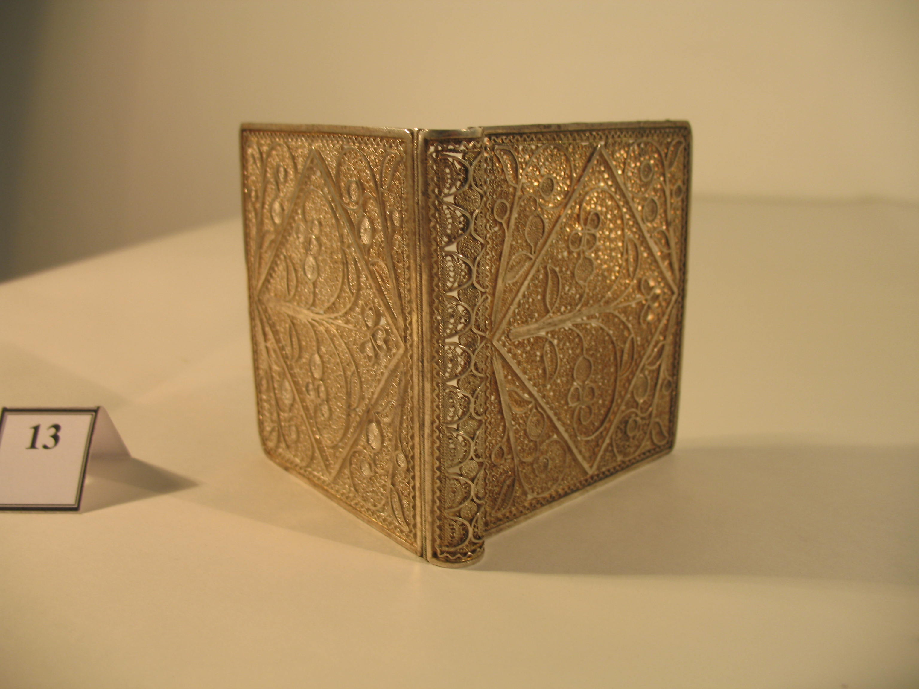 Табакера во техника на филигран од Архивата на Музејот на Тутун, Прилеп.